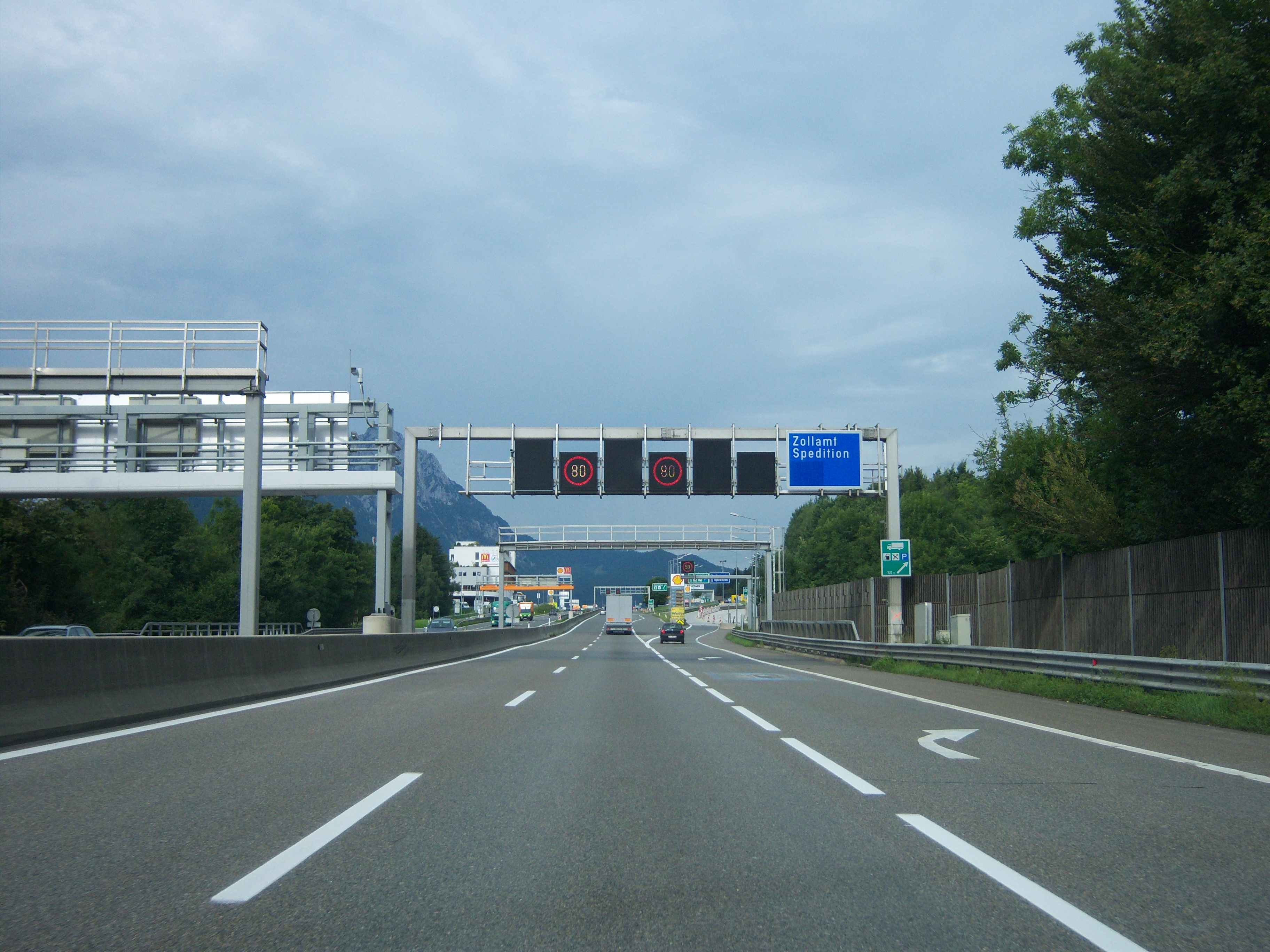 West Autobahn A1 Richtung Deutschland im Bereich des Grenzübergang Walserberg